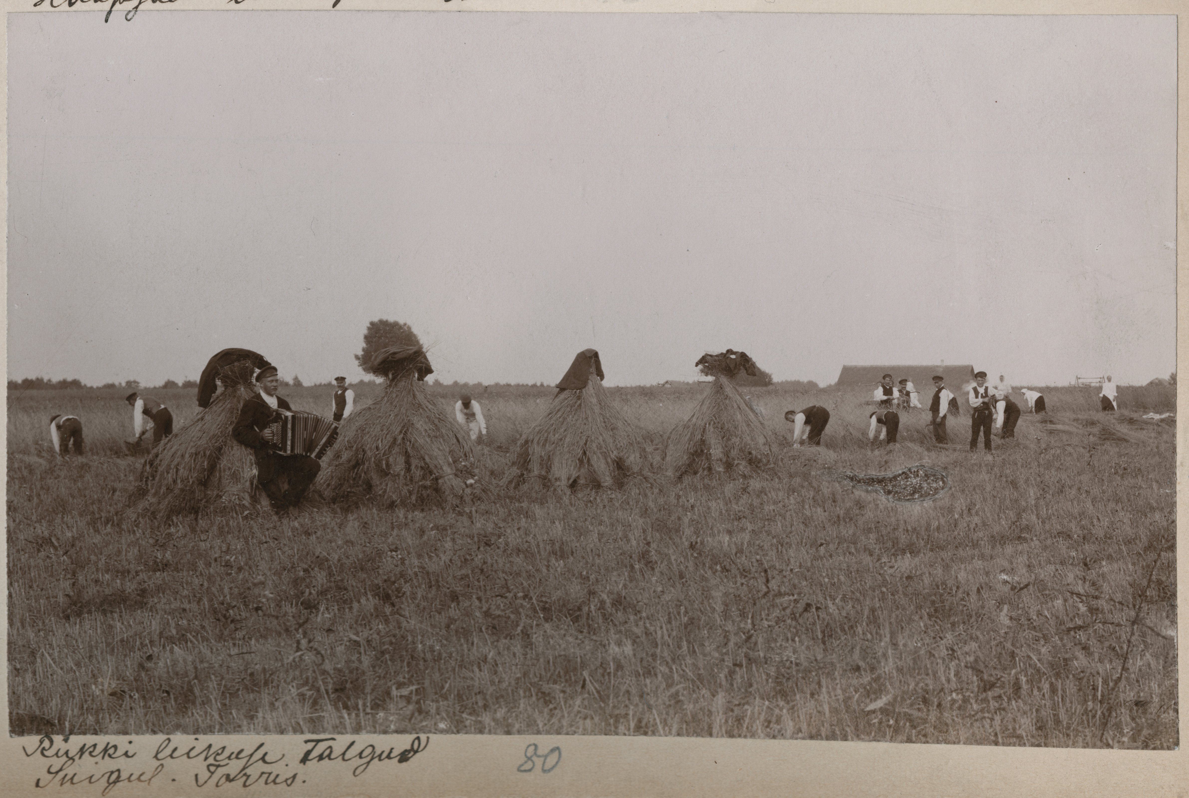 Rukkikoristuse talgud põllul.